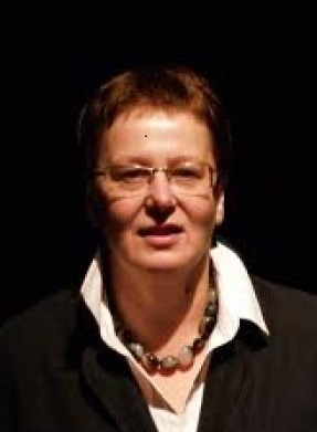 Inka Dowlasz1